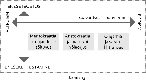 Elitarismi meetodid elanikkonna majanduslikuks alistamiseks paigutatuna võrdsuse teljele.